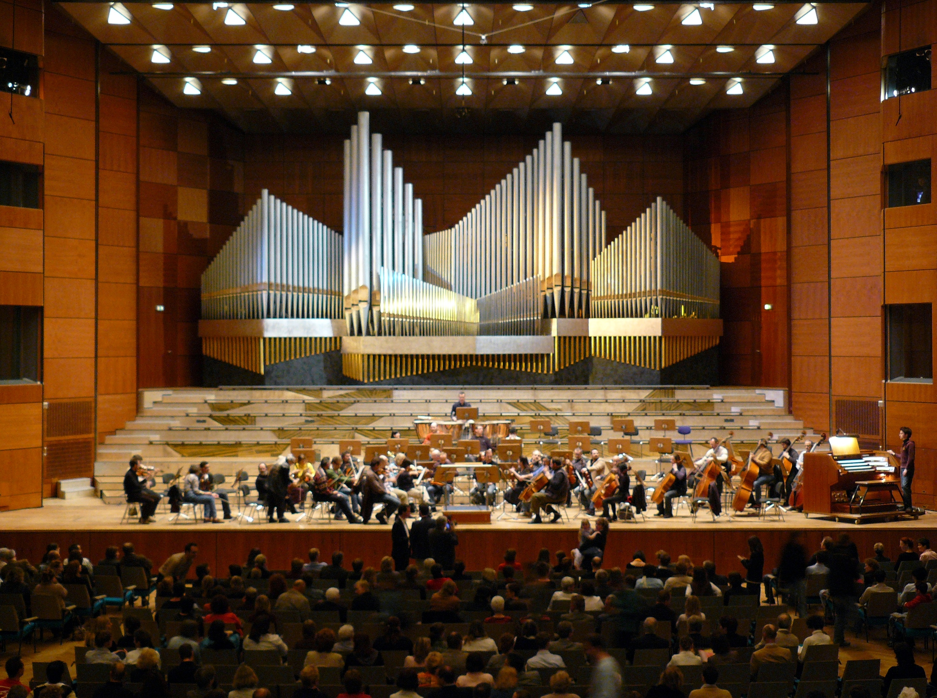 Arbeitsprobe der Nürnberger Symphoniker für Musica Sacra im Großen Saal der Meistersingerhalle